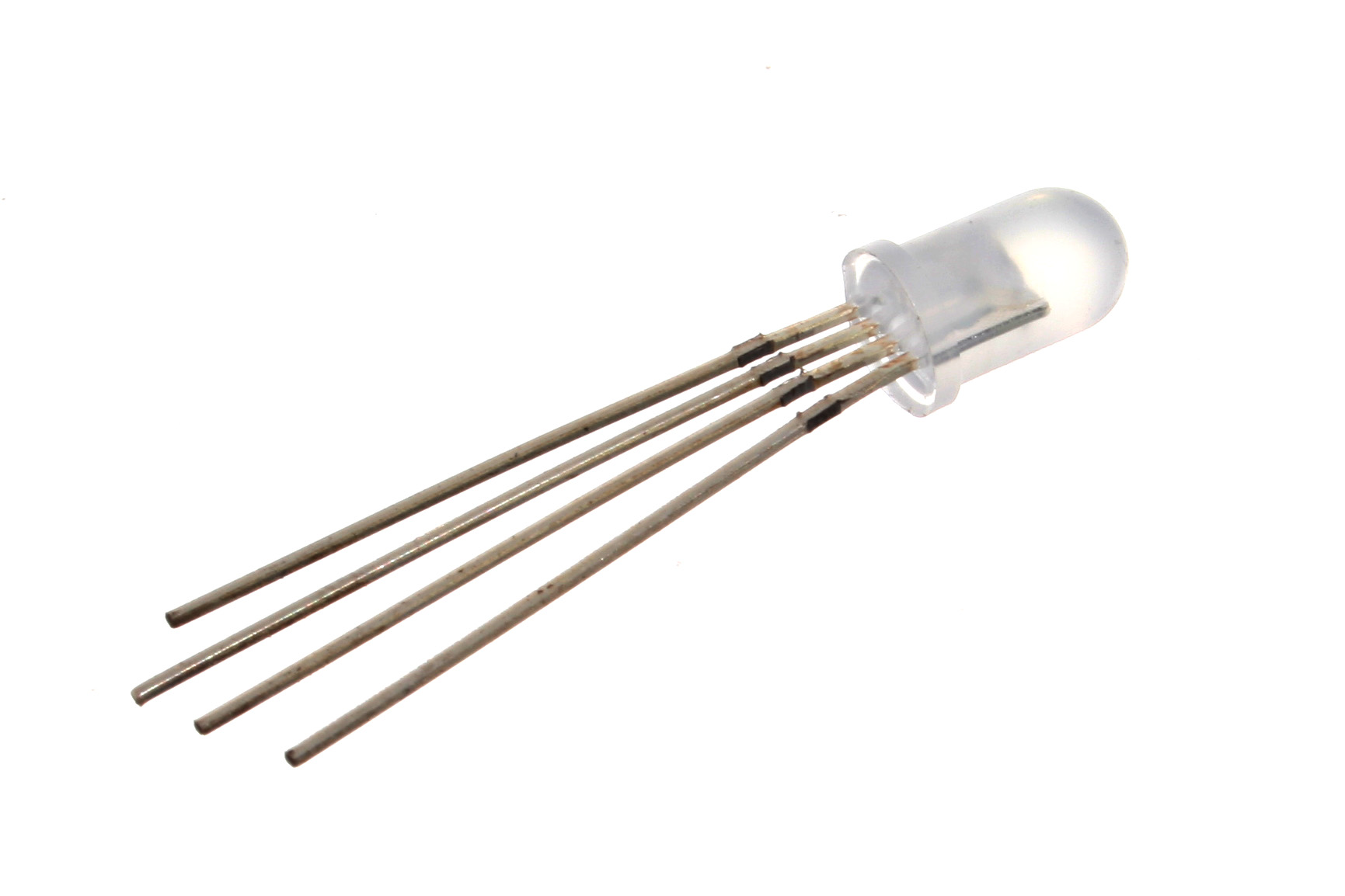 5mm RGB LED.